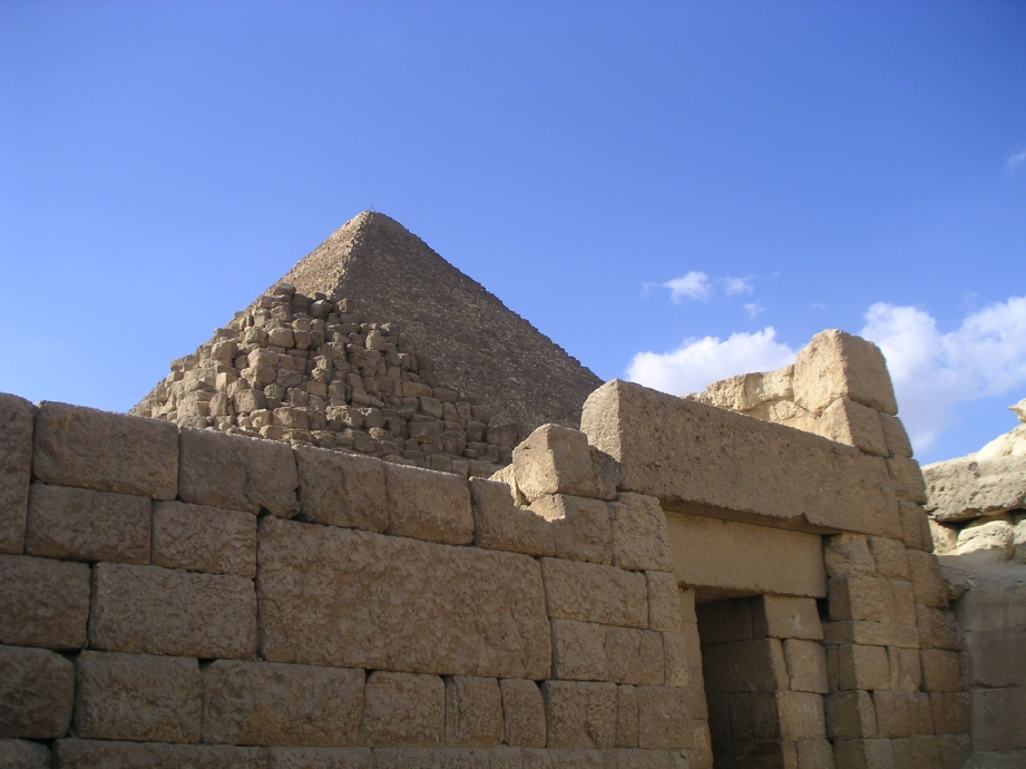 Mastaba de Khoufoukhaf II à Gizeh